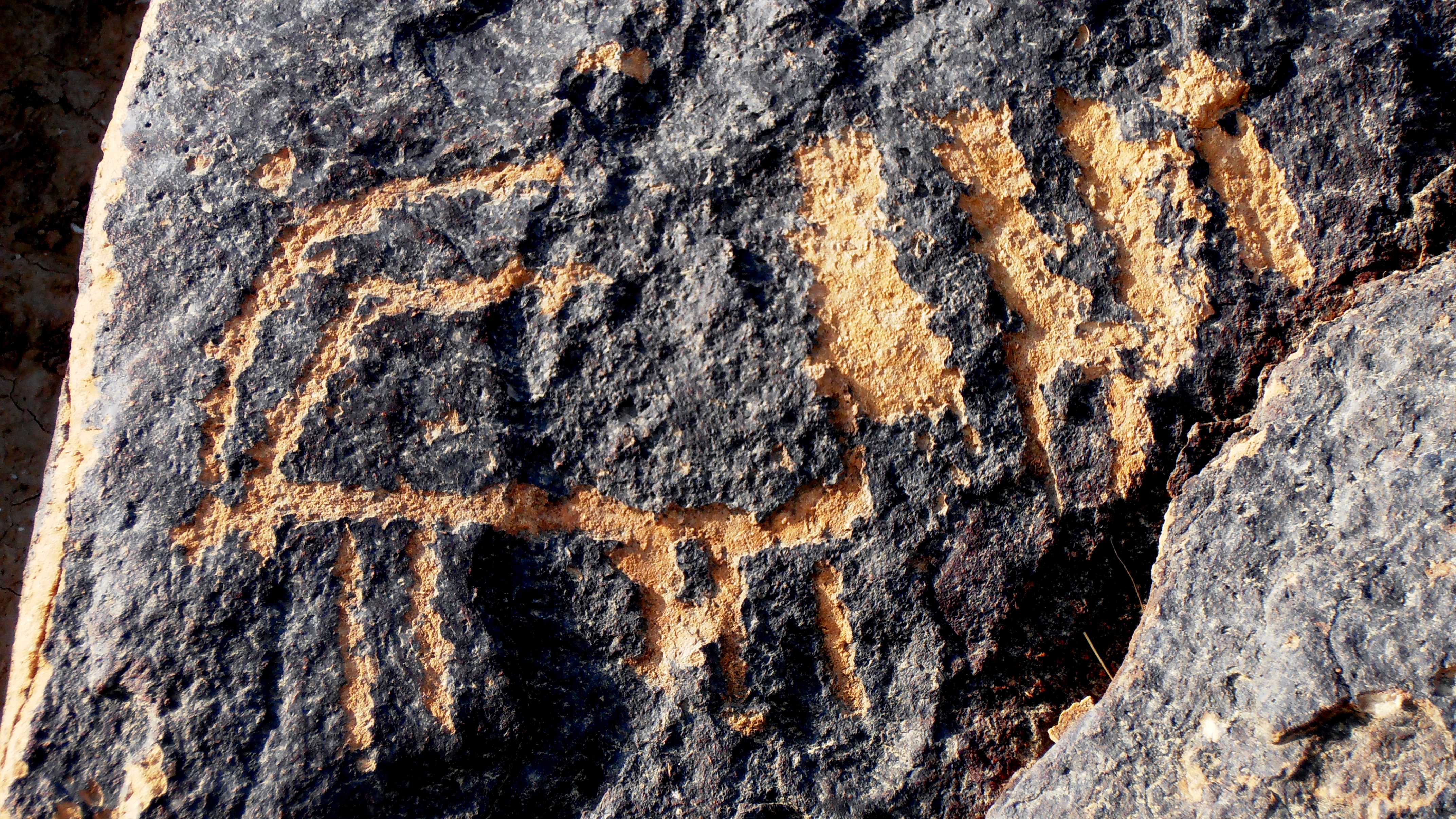 Rock Engraving; Negev Mountains, Israel תחריטי סלע; הר מחייה, הנגב